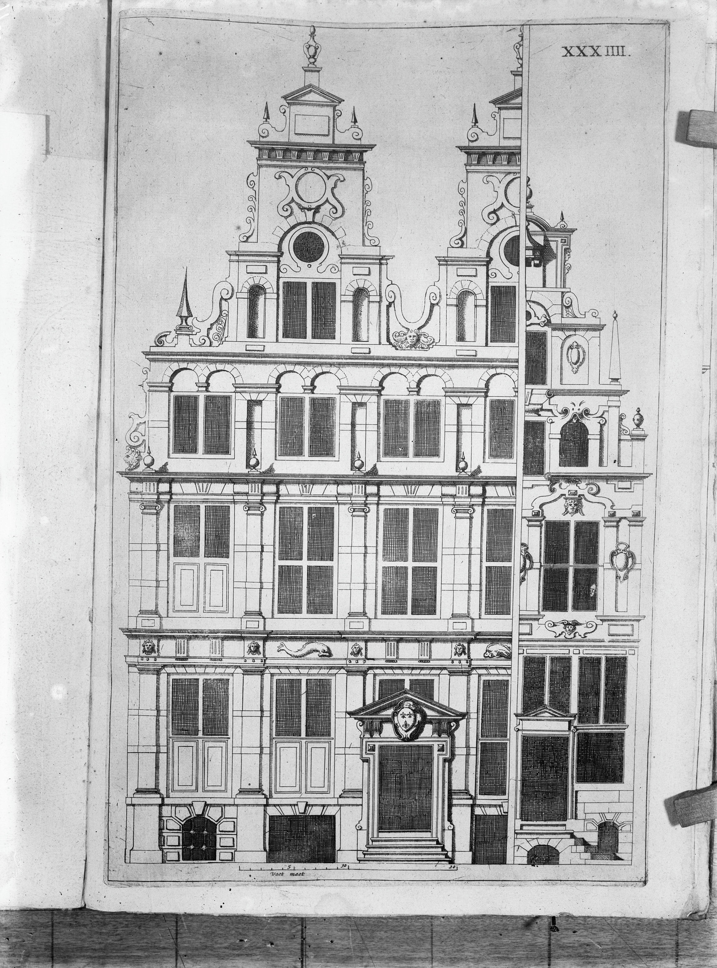 Halsgevel: Ontwerp van een gevel van Hendrick de Keyser (opmerking: Reproductie uit: Architectura Moderna ; p. 34)